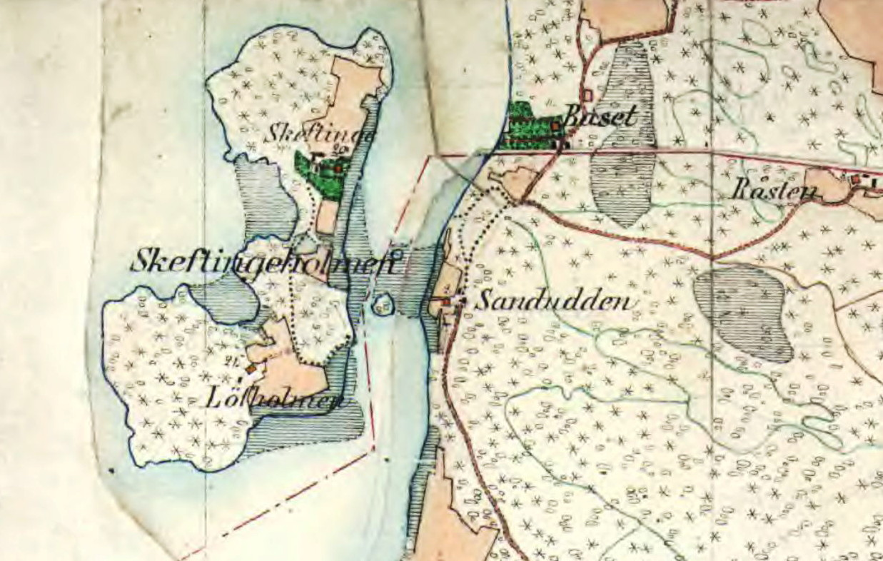 Skäftlingeholmen i Mälaren